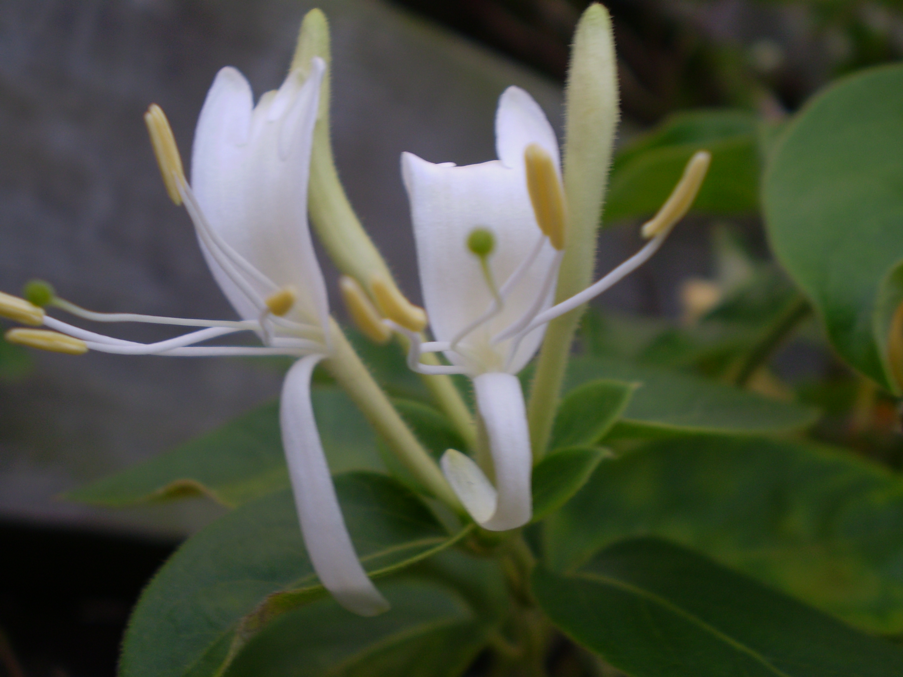 Lonicera periclymenum